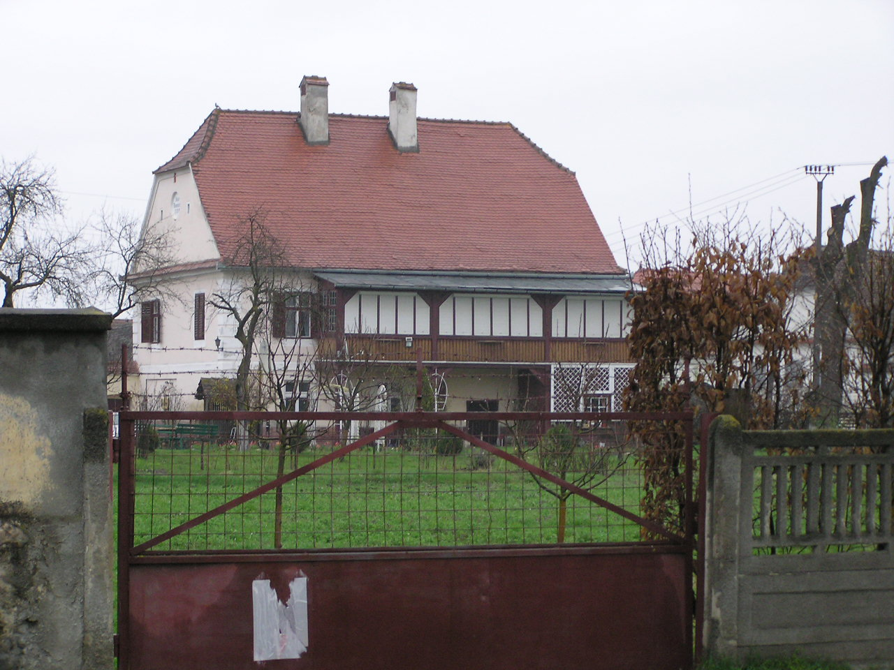 Ehemaliges evangelisches Pfarrhaus (Gartenseitig), des Dorfes Bradu / Girlsau, Siebenbürgen, Rumänien.